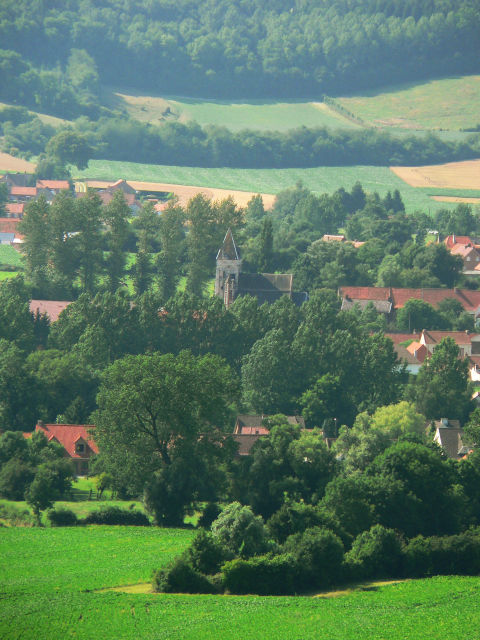 Vue depuis une colline sur le centre de La Comté, avec l'église Saint Martin.